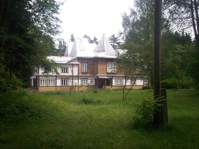 Дом-музей И.Е.Репина в Пенатах